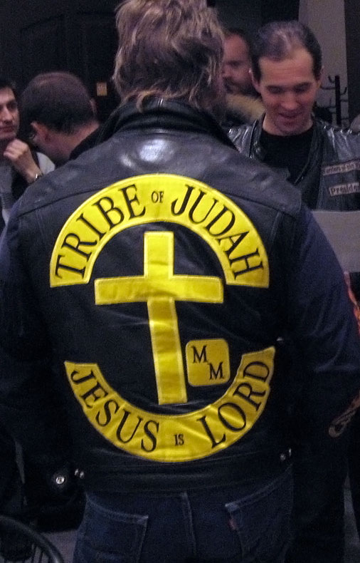 Фотография нашивок мотоклуба Tribe of Judah MM